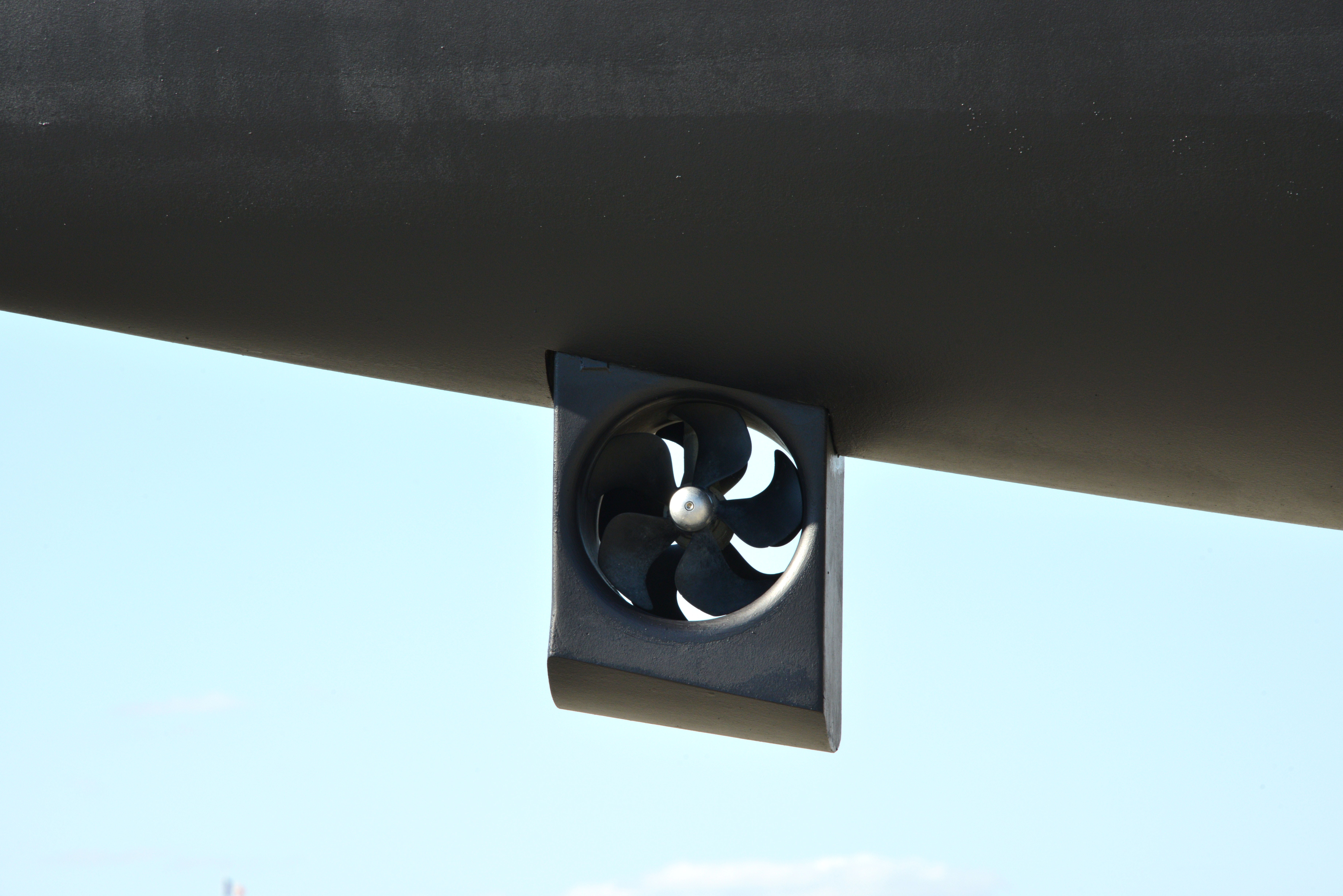 Un propulseur d’étrave (propulseur transversal) à l’avant et dessous la coque d’un voilier. Cet appareil sert à manœuvrer dans les zones portuaires. Photographie prise sur un yacht en entretien sur le plateau nautique de la Ville en Bois, La Rochelle, France.